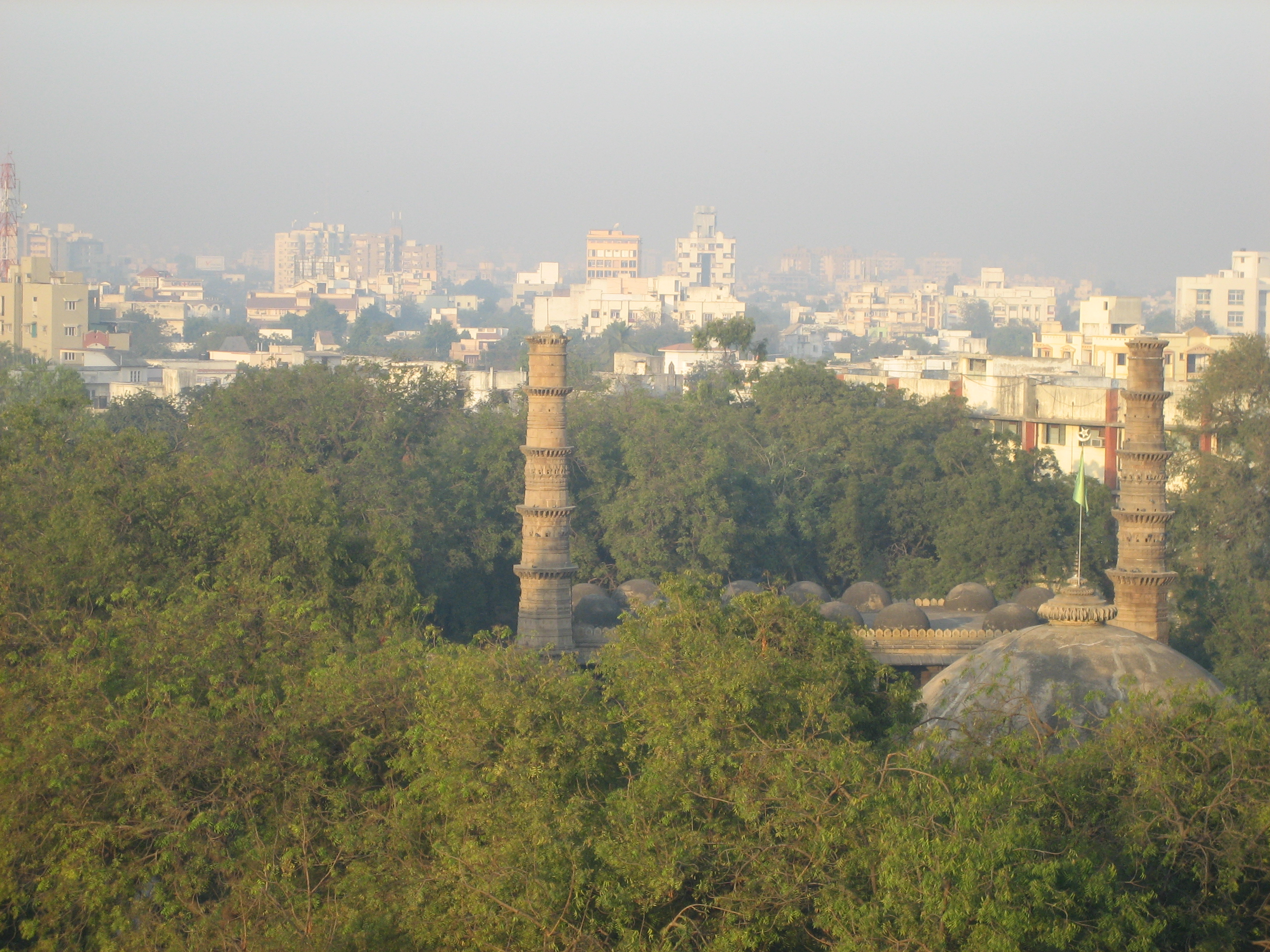 Ahmedabad 2007